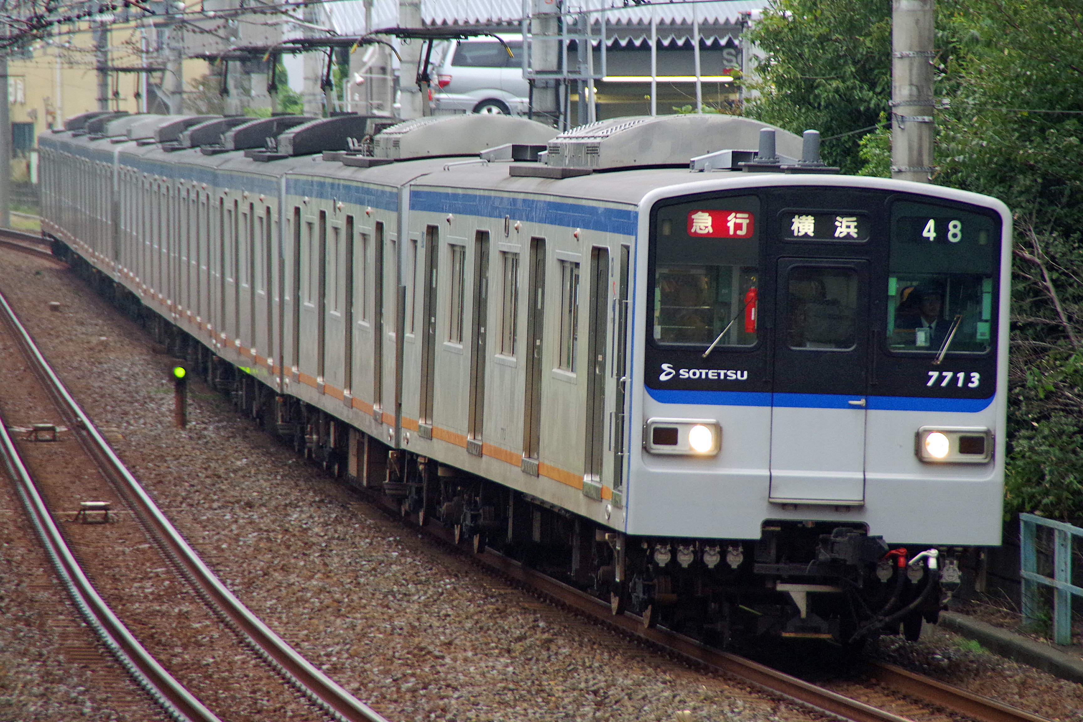 二俣川付近を走行中の新7000系新塗装車。